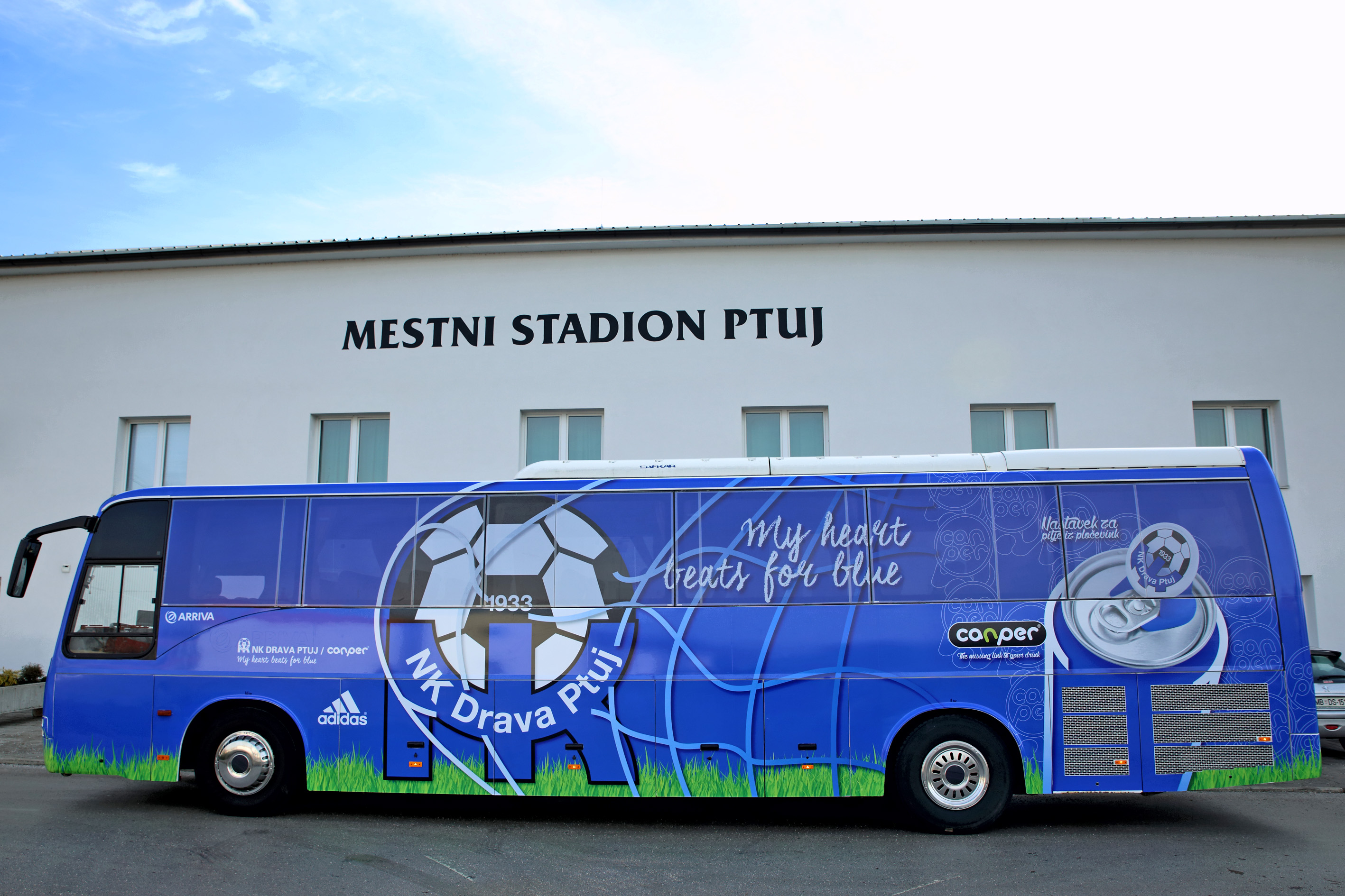 Avtobus nogometašev NK Drave Ptuj